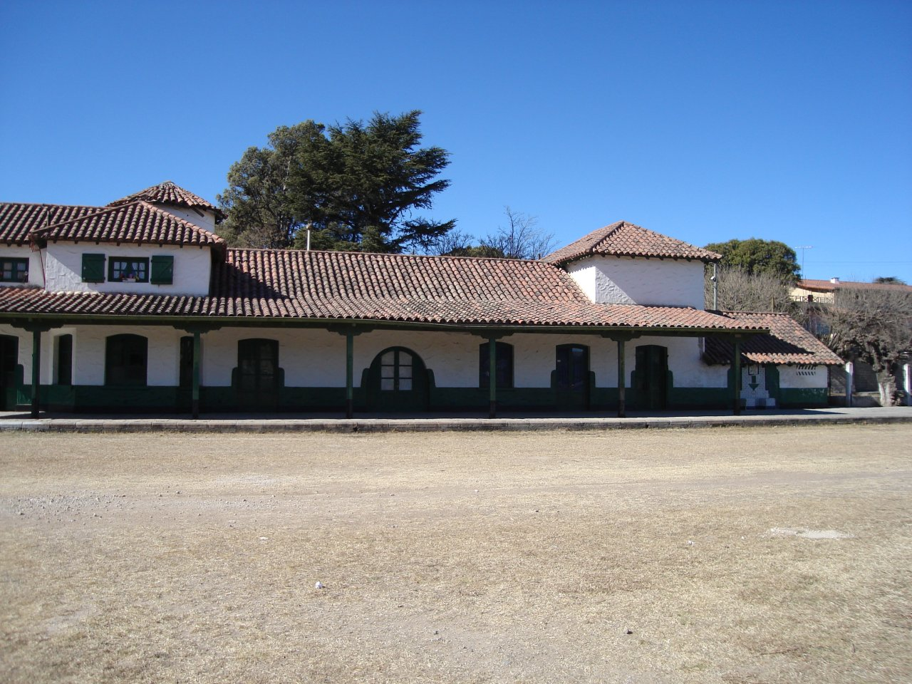 Estación Huerta Grande del Tren de las Sierras antes de la rehabilitación del servicio, en la ciudad de Huerta Grande, Departamento Punilla, Provincia de Córdoba, Argentina.